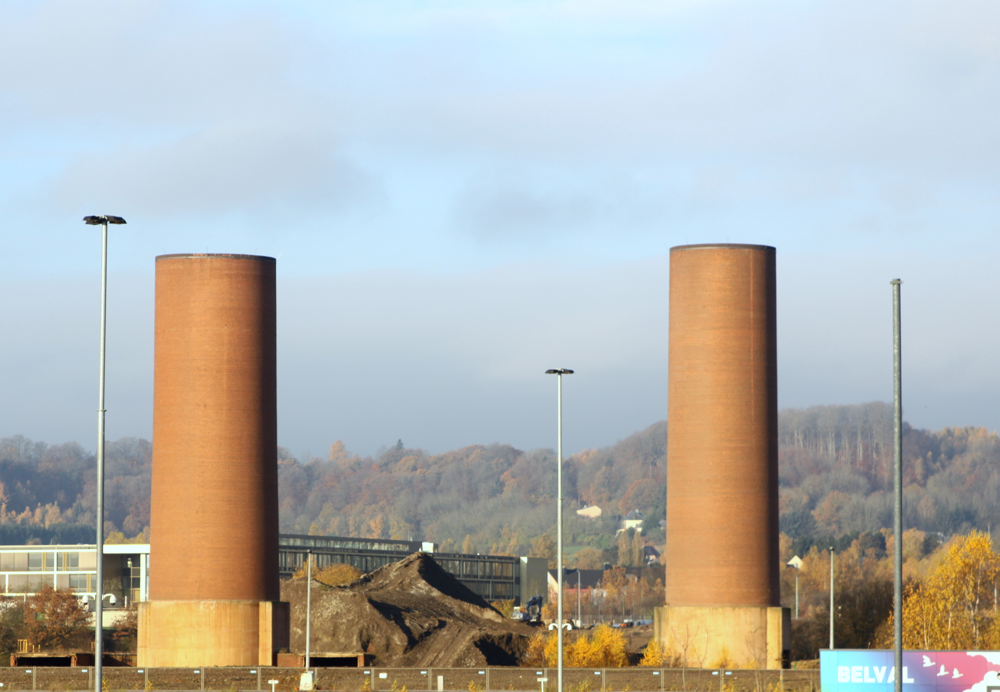 Déi gekäppt Tierm um Belval am November 2012